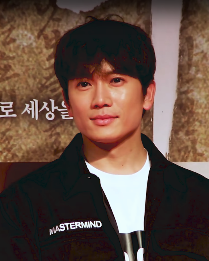 영화 '흥부' VIP시사회 포토월